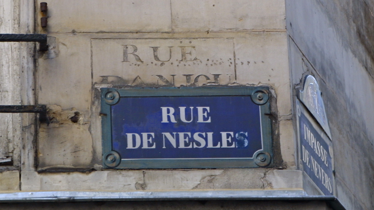 Plaque de rue indiquant « Rue de Nesles », dans la rue de Nesle, à l'angle de l'impasse de Nevers, à Paris